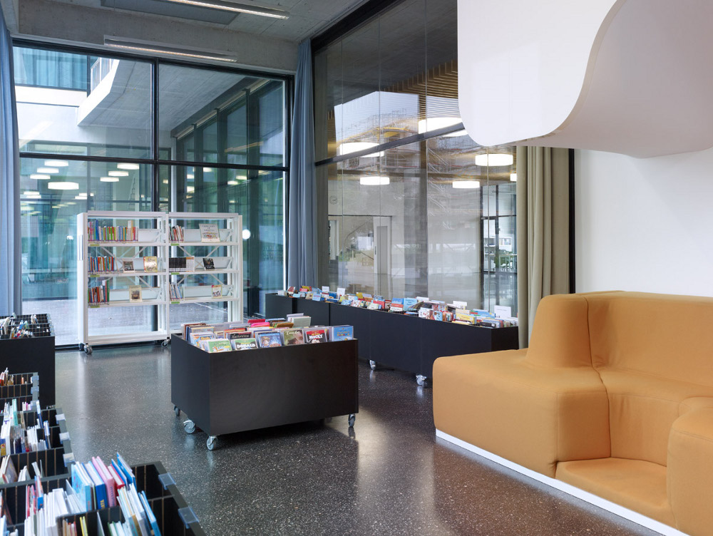 Pesstalzzi-Bibliothek Zürich, Bibliothek Altstadt